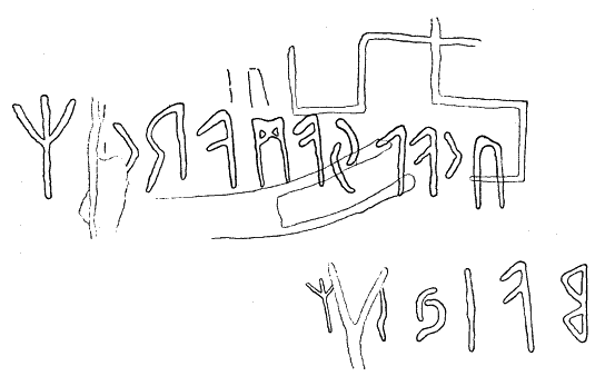 Kårstadsristningen (signum NKJ53) är en runhäll i Innviks socken, Stryns kommun i Norge, påträffad 1927. Kårstadsristningen består av ett hakkors, ett 10-tal delvis skadade skeppsbilder samt en inskrift med äldre runor.